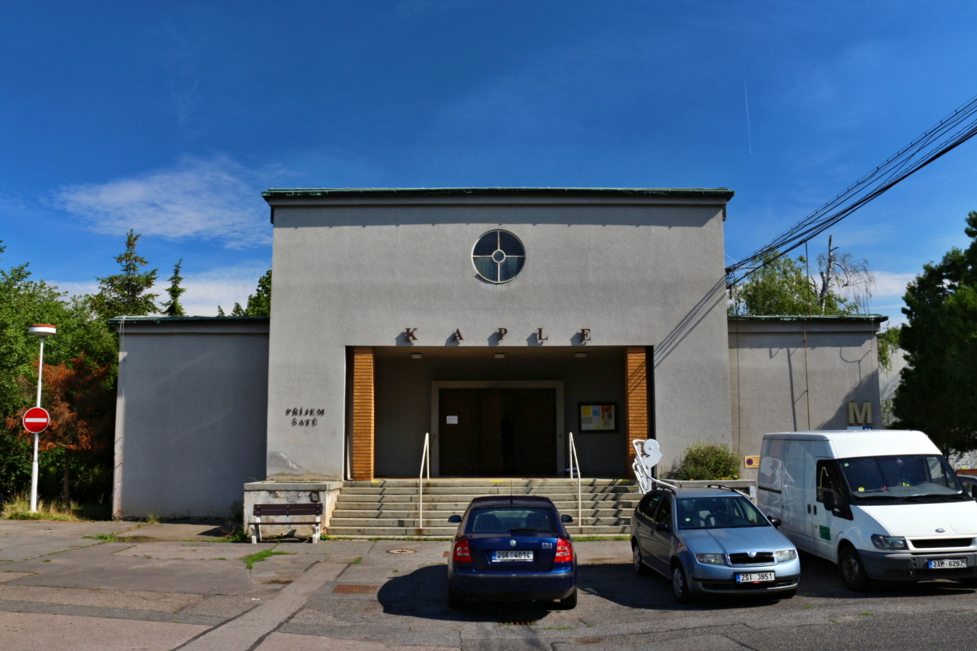 Kaple sv. Václava v areálu Thomayerovy nemocnice v Praze-Krči